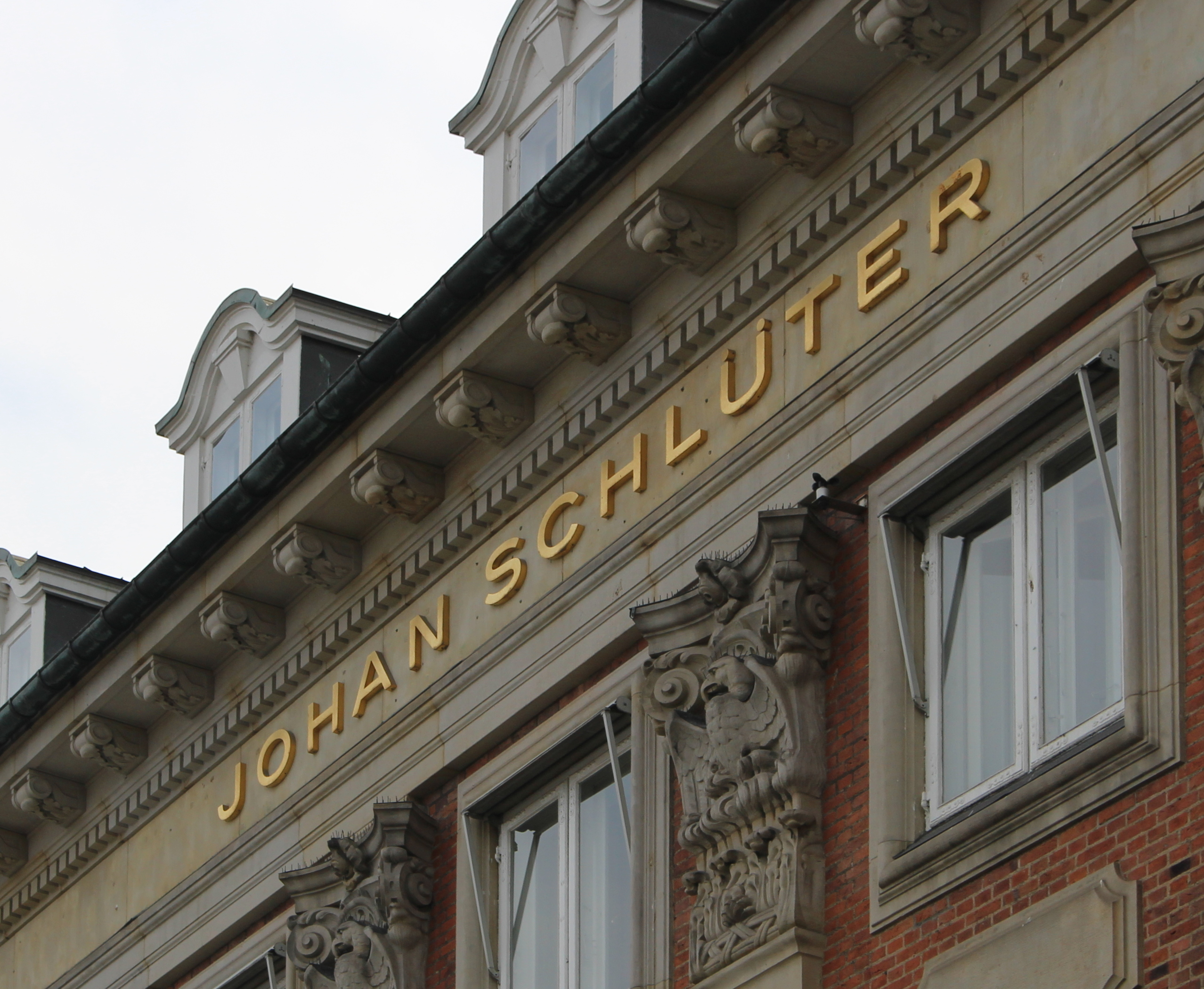 Facade af Johan Schlüter Advokatfirma, Højbro Plads nummer 10.